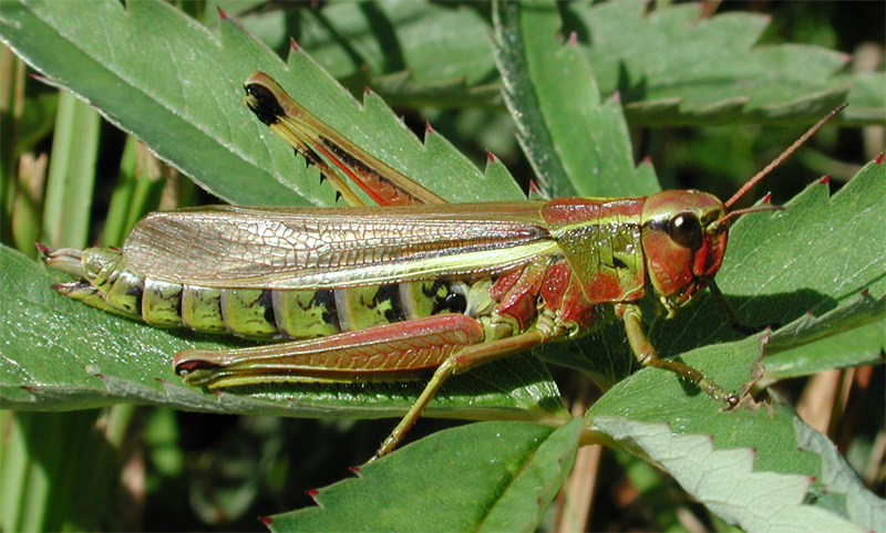 Stetophyma grossum, female, Grosse Sumpfschrecke, Weibchen, Elbmarsch bei Hamburg, (NSG Kirchwerder Wiesen)